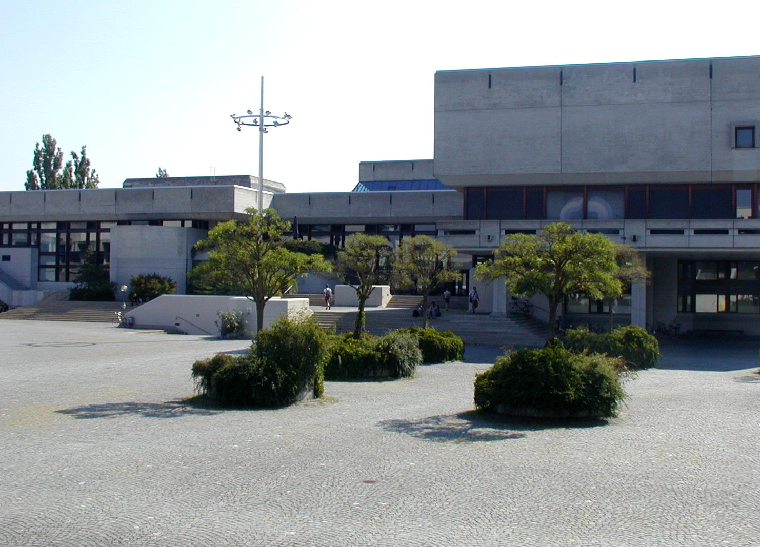 Zentralbibliothek der Universitätsbibliothek Regensburg